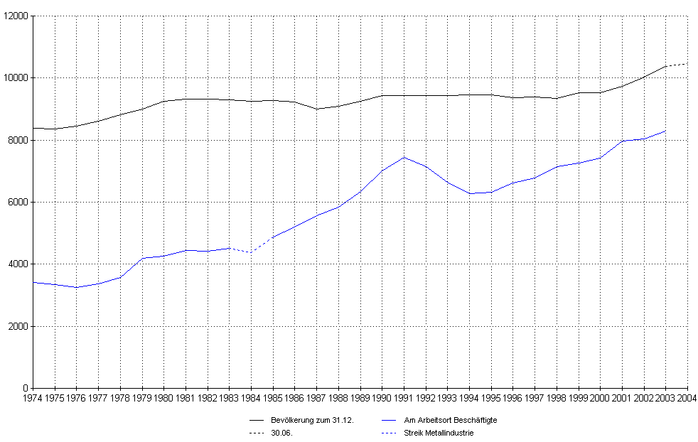 Schaubild zur Entwicklung von Bevölkerung und Arbeitsplätzen in Schwieberdingen